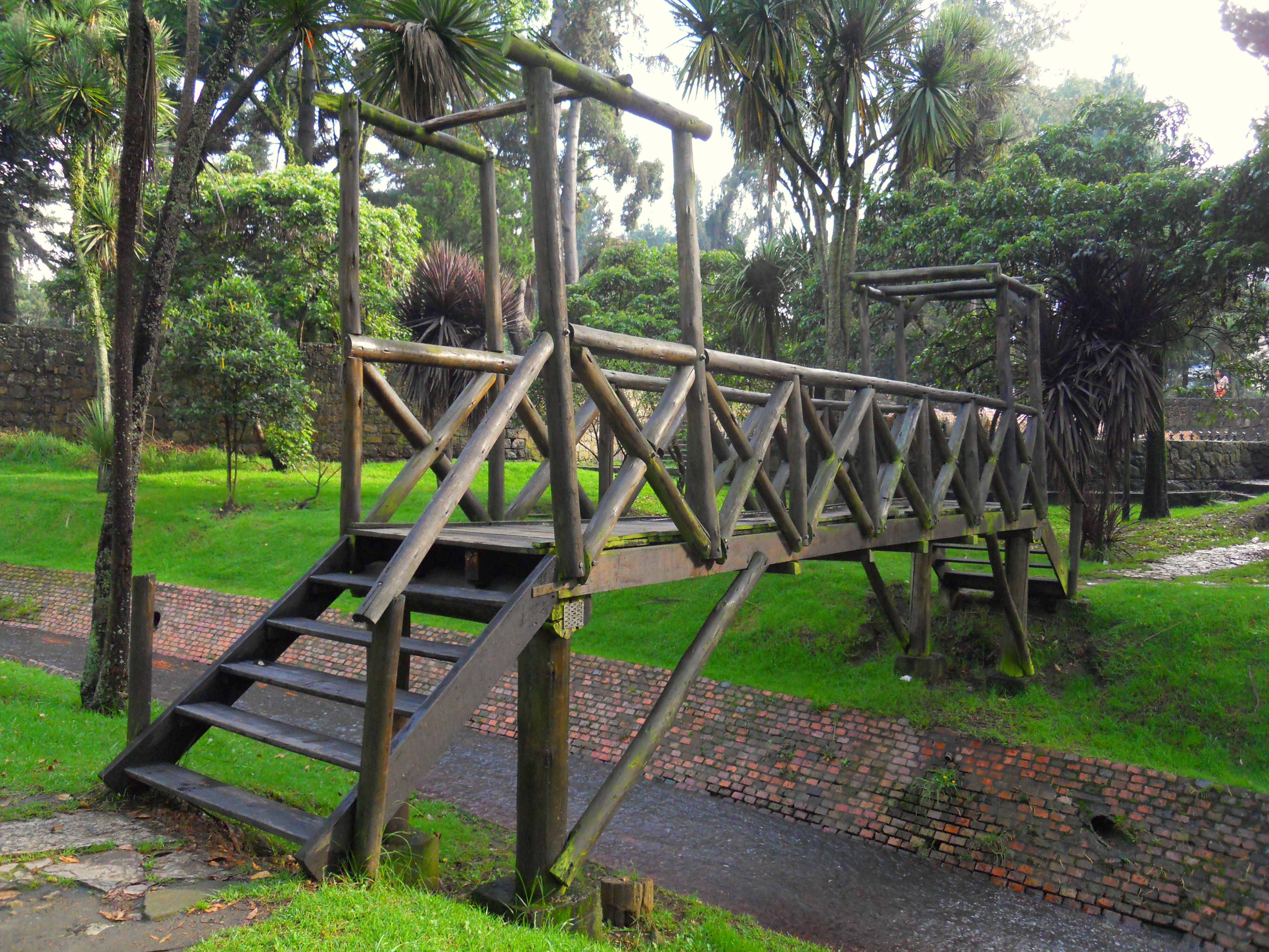 Puente sobre el río Arzobisco en el Parque Nacional de Bogotá. Calle Treinta y seis con carrera Sexta.